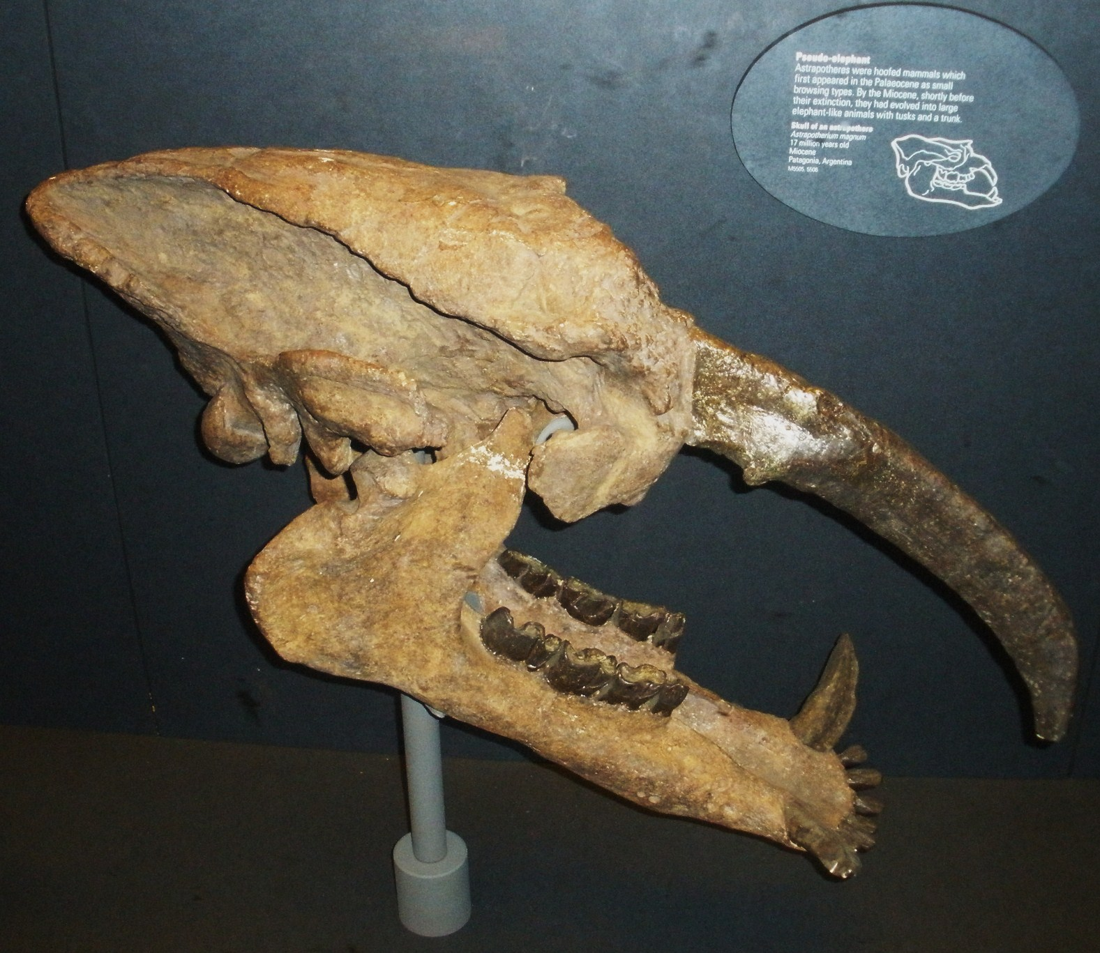 Fossil of Astrapotherium, an extinct mammal-- Took the photo at Natural History Museum, London